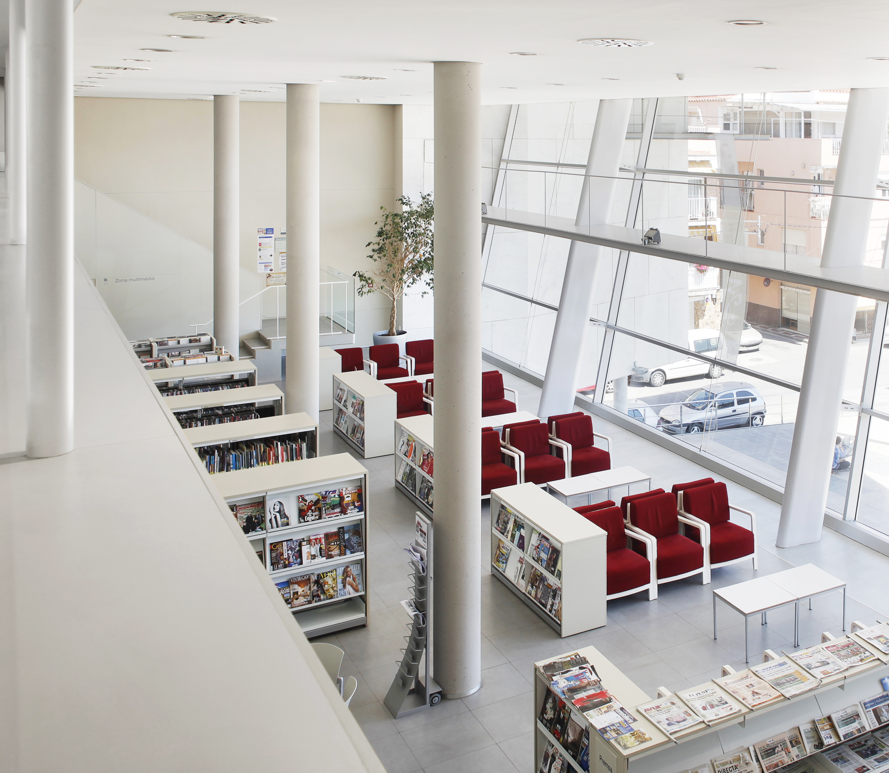 Vista de l'hemeroteca des de l'Altell de la Biblioteca Comarcal de Blanes.